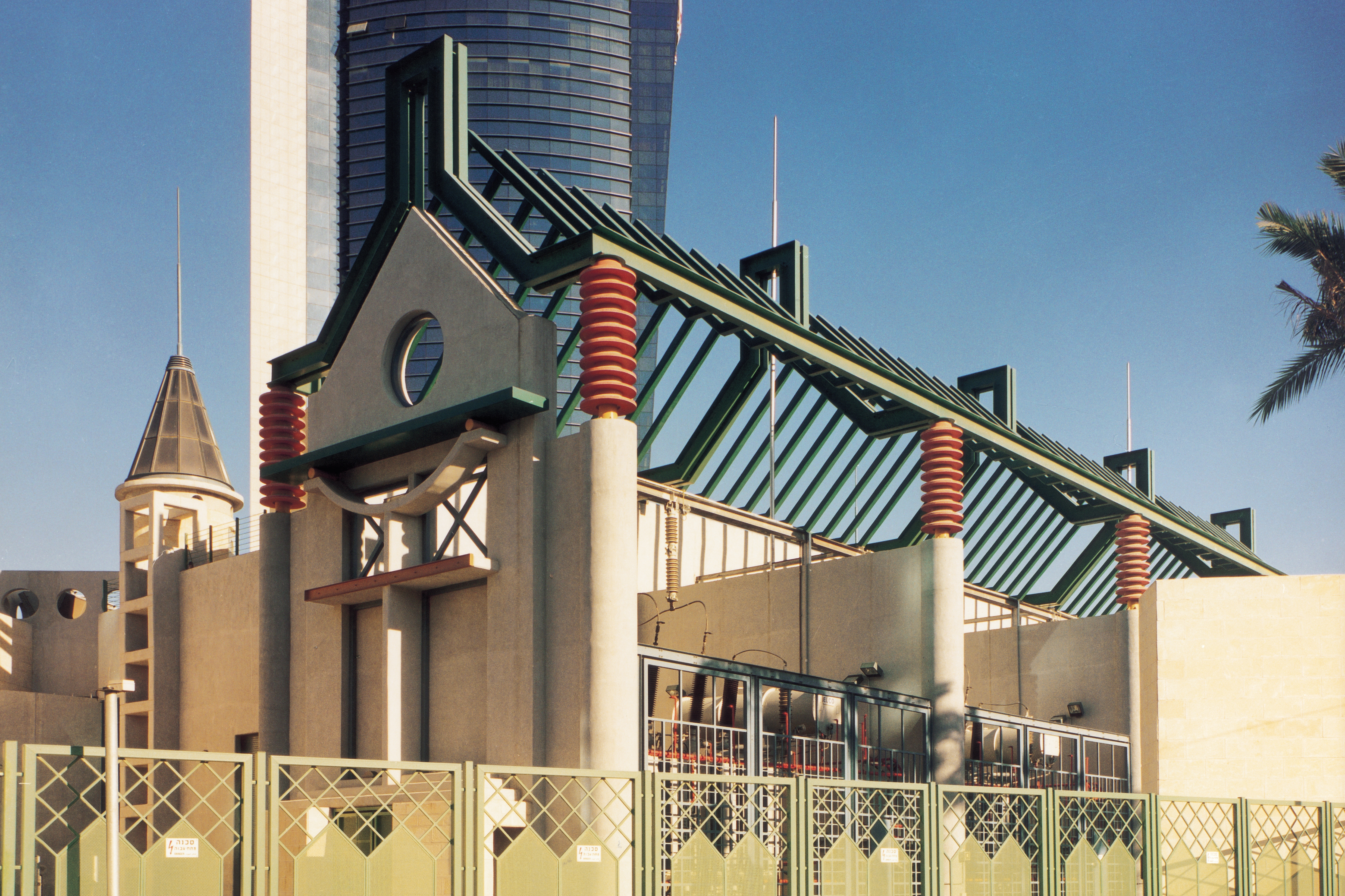 תחנת משנה "הקריה", תל אביב